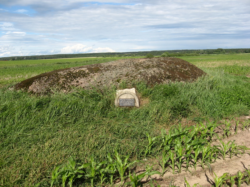 Вялікія Пугачы. Пугачоўскі вялікі камень